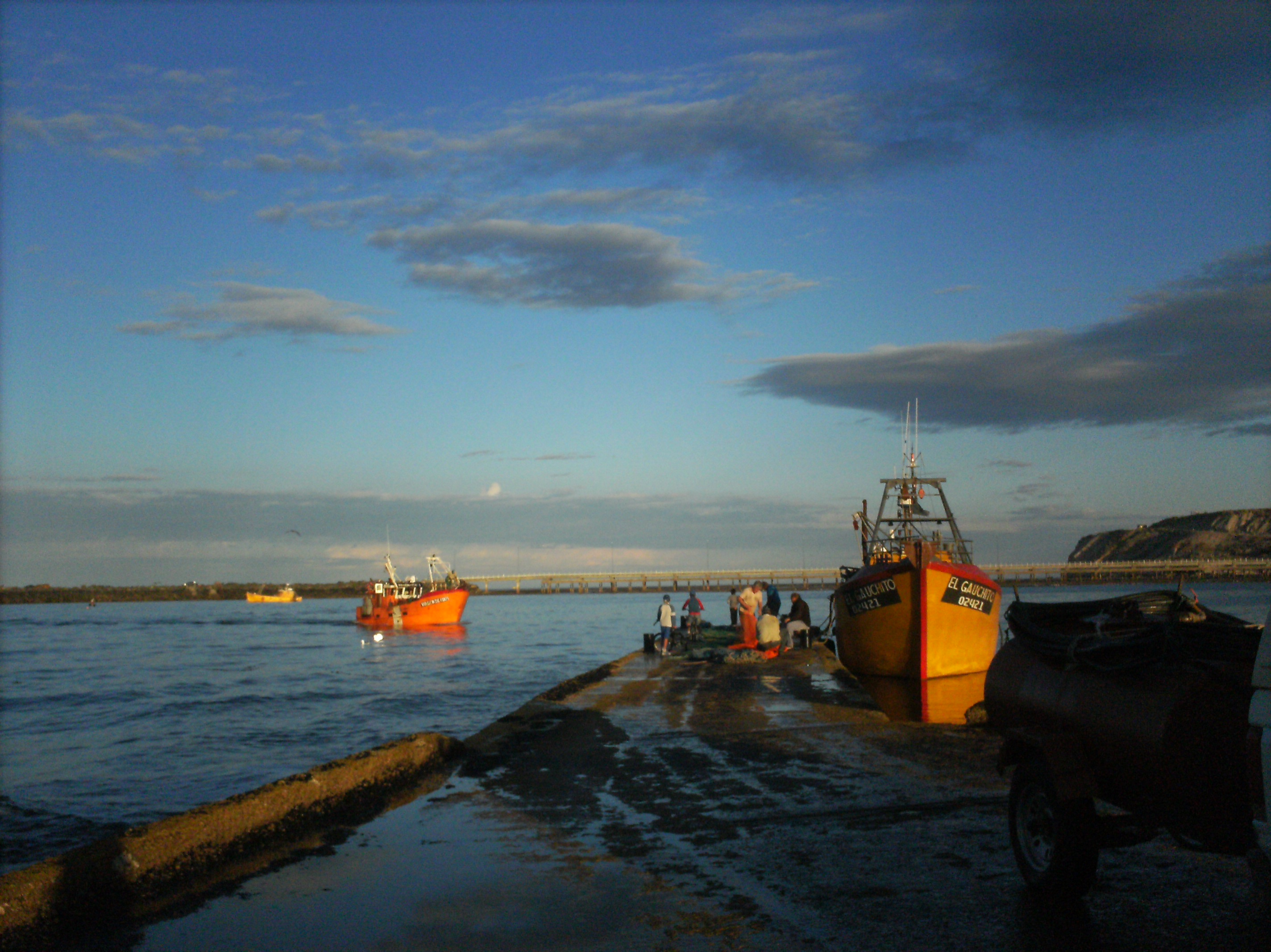 LA pesca en el puerto de de caleta cordoba